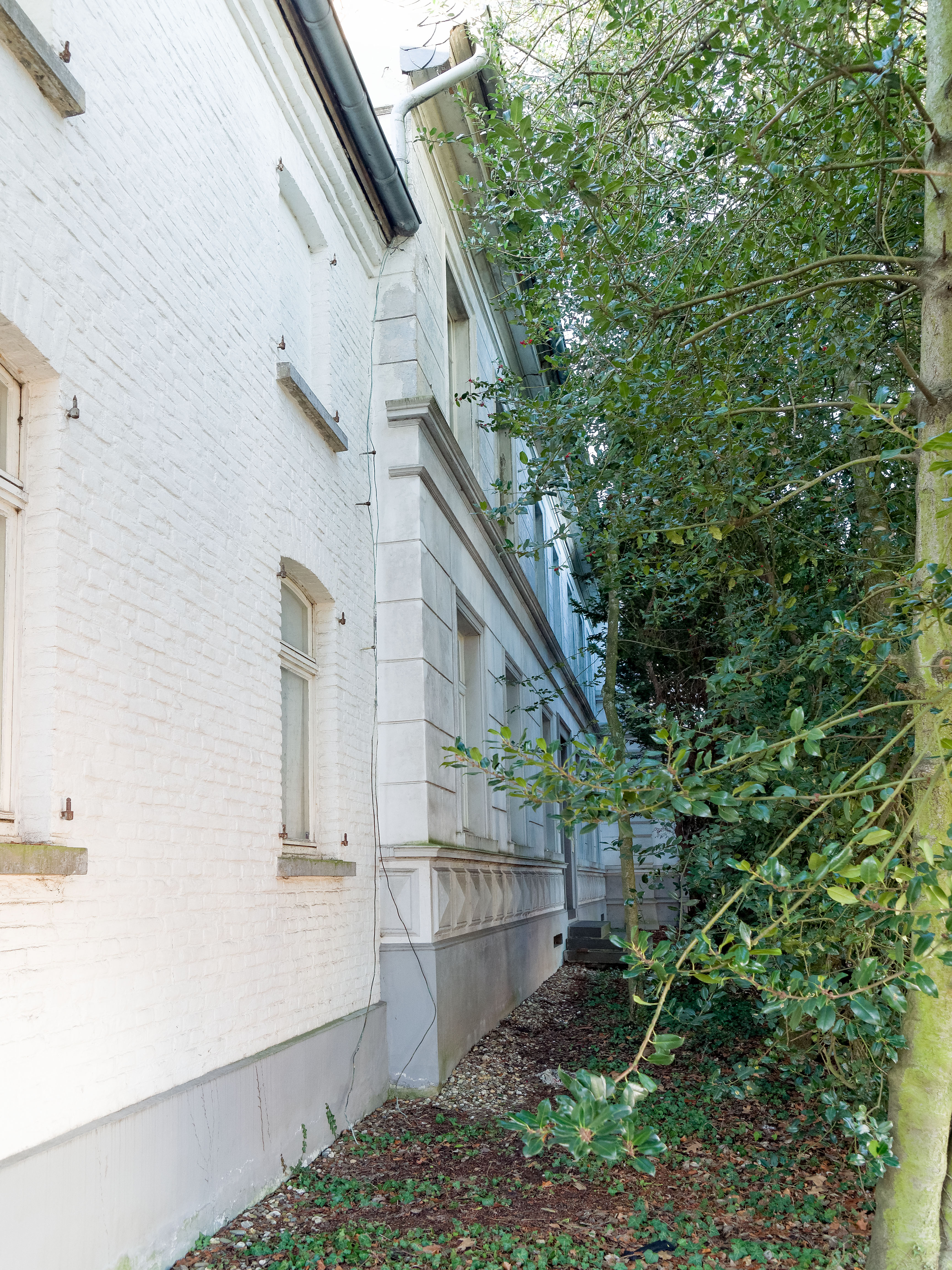 Korschenbroich Denkmal 001: Hauptstraße 101 - leider (2019_02-14) durch Baumbestand komplett verdeckt (Ansicht aus Richtung Hauptstraße 99)